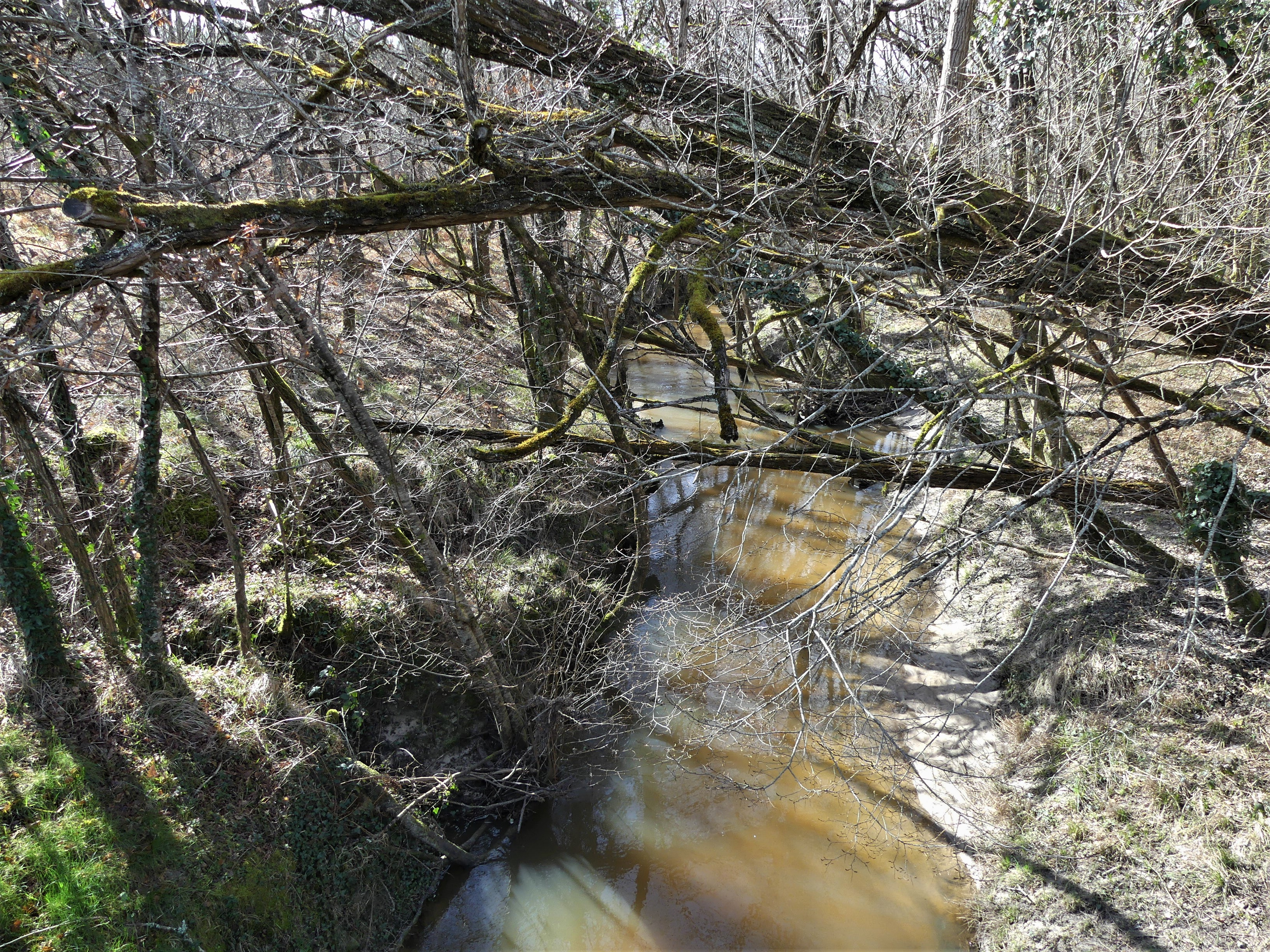 Le Chalaure au pont du Genêt, en aval de la route départementale 730, Saint-Michel-l'Écluse-et-Léparon, La Roche-Chalais, Dordogne, France.